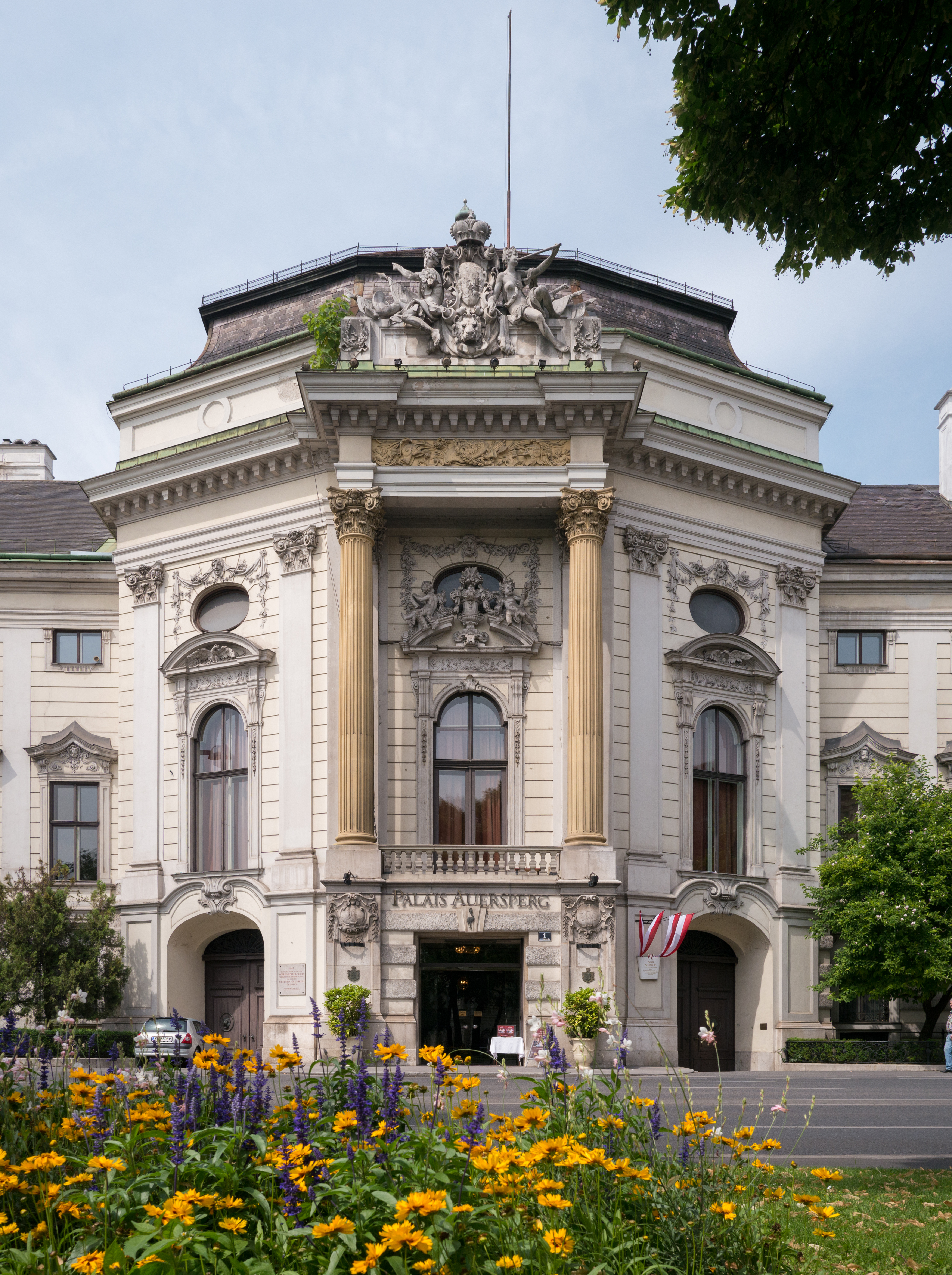 Palais Auersperg, ehem. Palais Rofrano